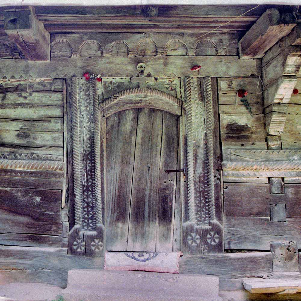 Bălan, Sălaj, biserica de lemn din Josani, portalul de la intrare.